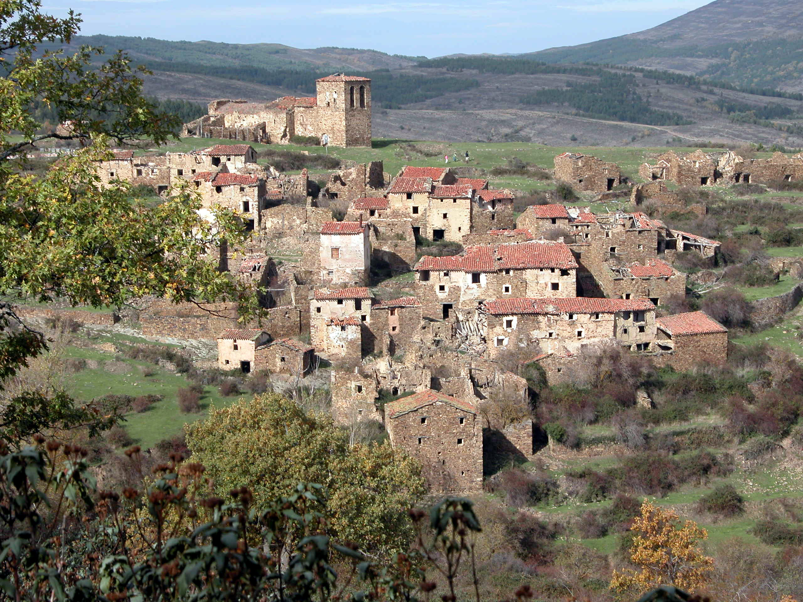 La Santa, despoblado de Munilla (La Rioja - España)